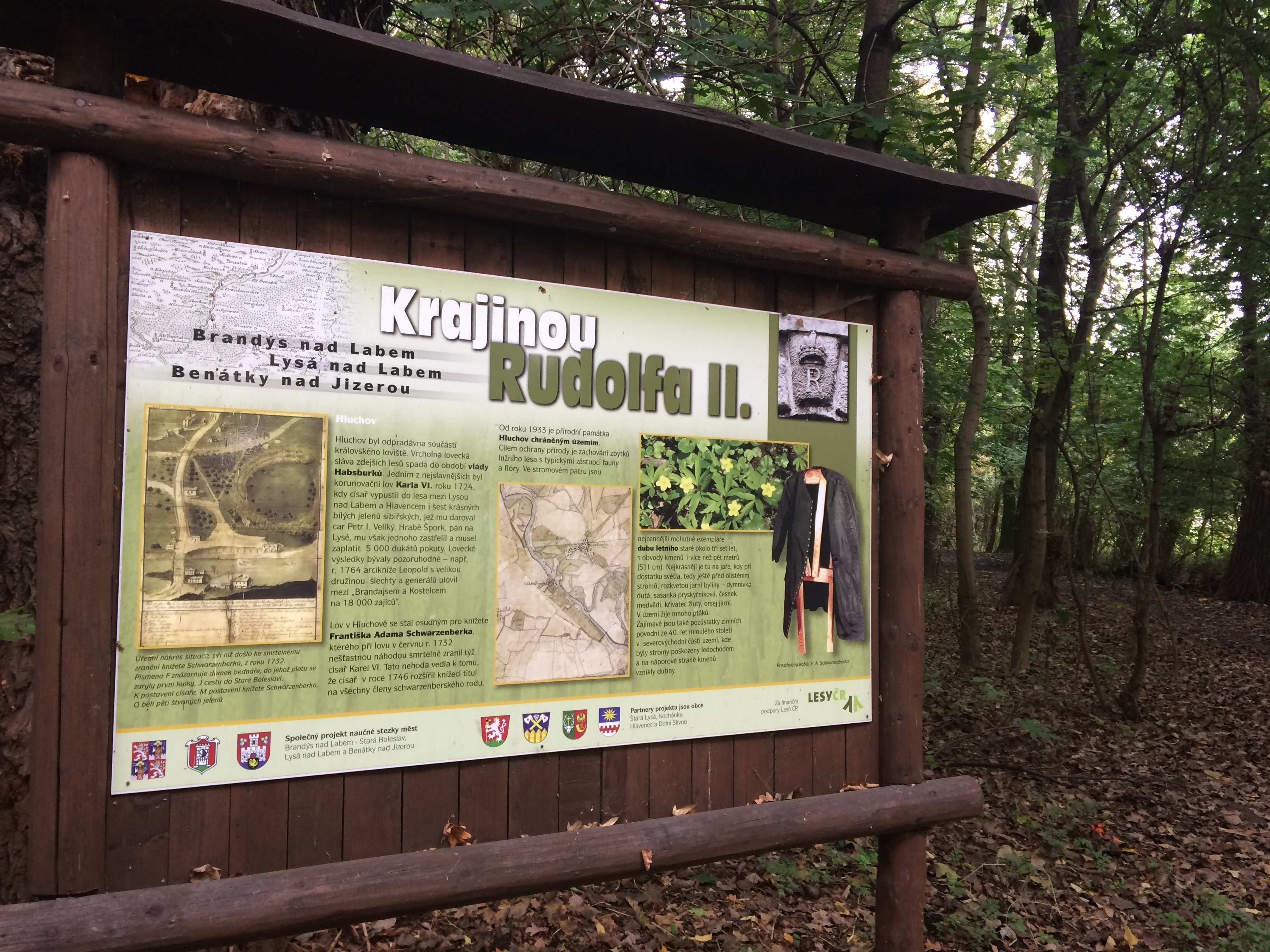 Informační panel naučné stezky v Hluchově